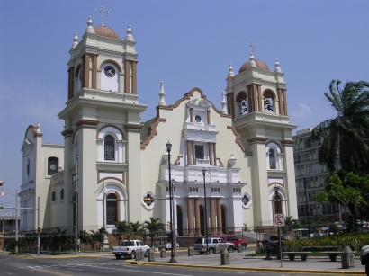 Catedral de San Pedro Sula